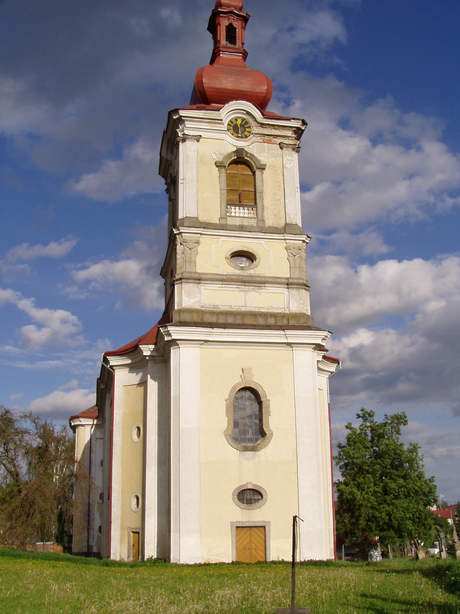 Kostel Povýšení svatého Kříže (Choustníkovo Hradiště)